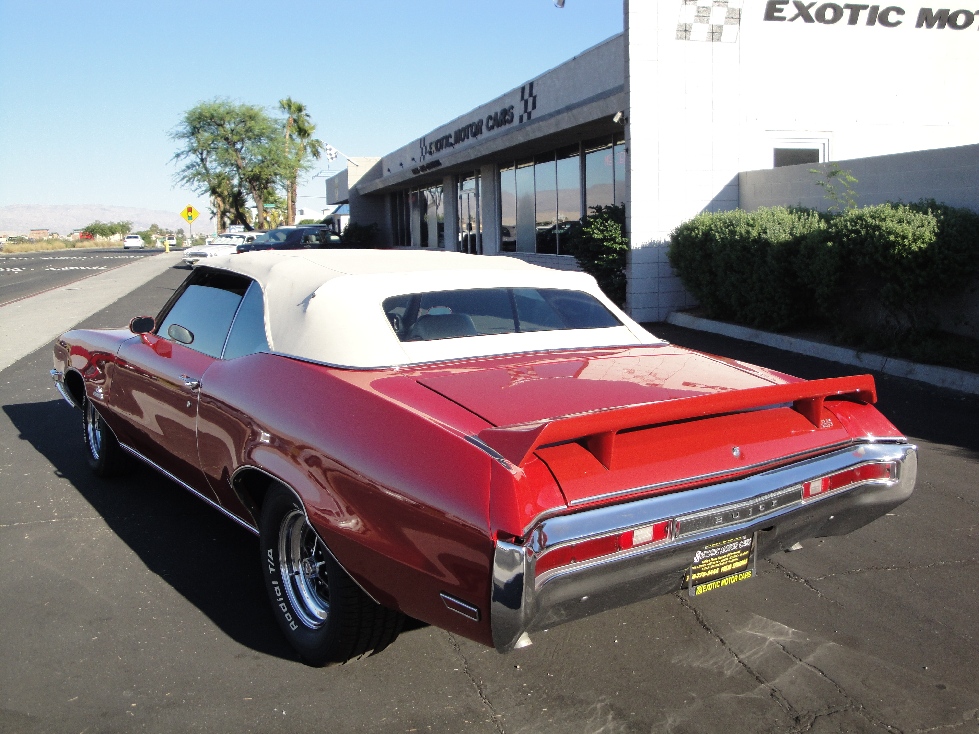 70 Buick GS Stage 1 (Clone)